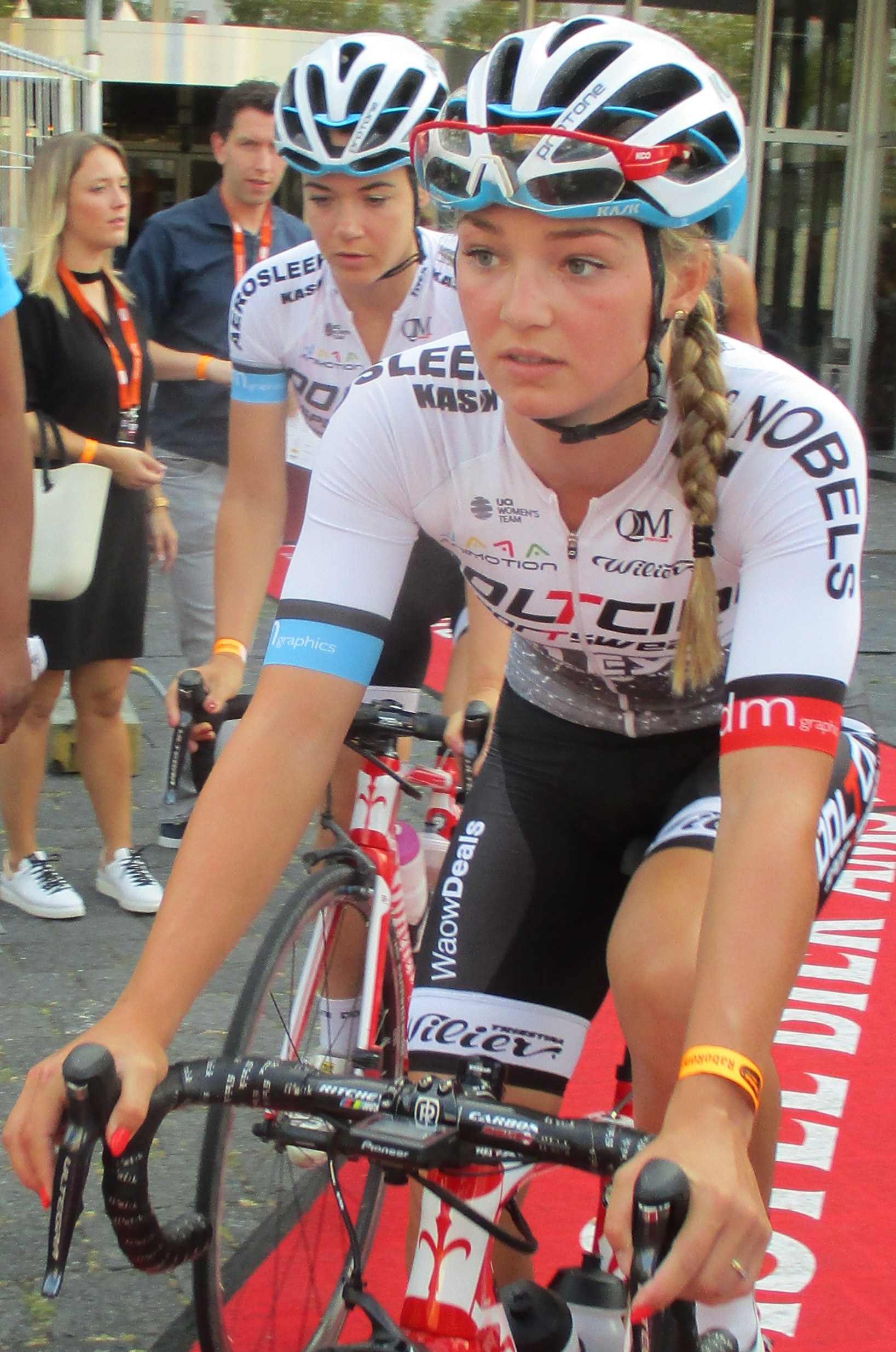 Criterium RaboRonde in Heerlen, Limburg, vrijdag 3 augustus 2018